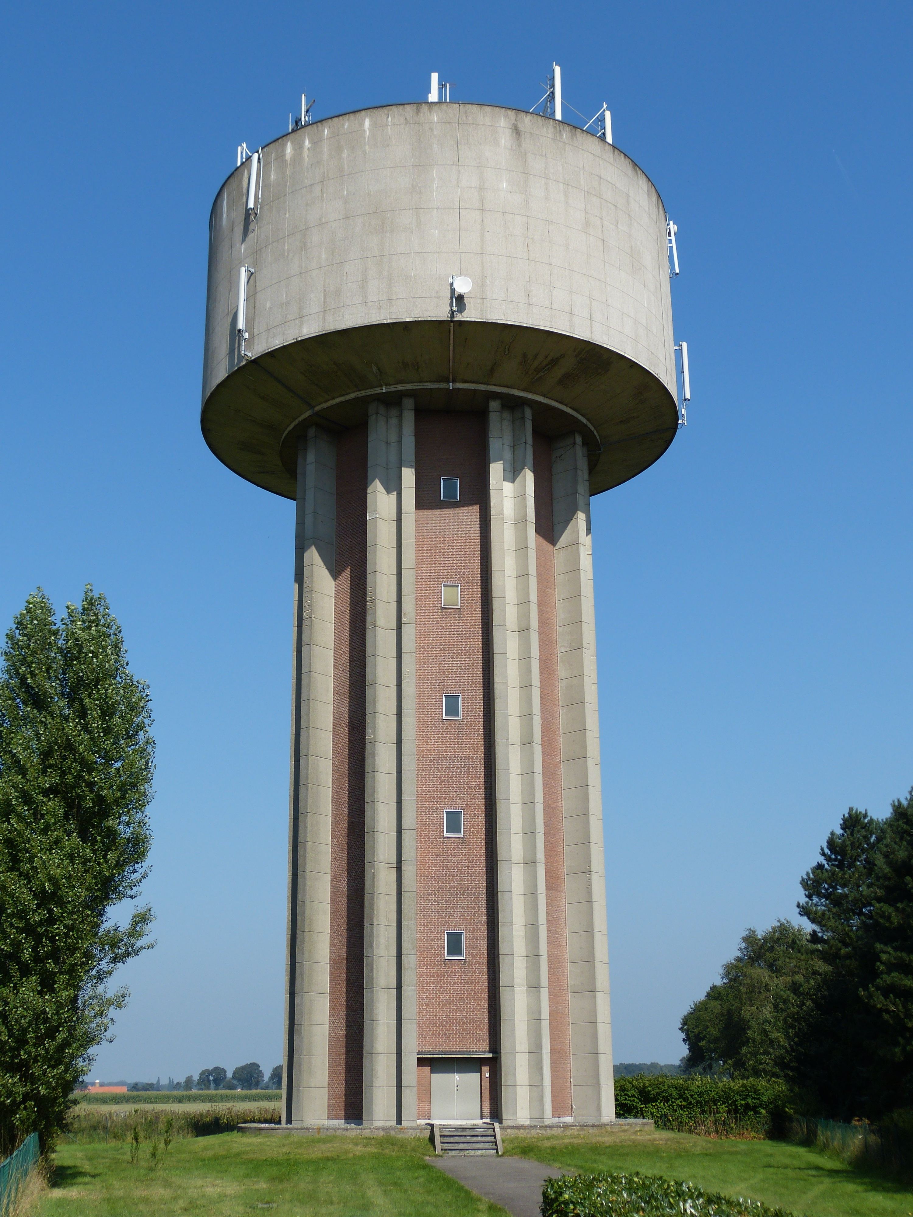 Oostmalle Turnhoutsebaan Watertoren